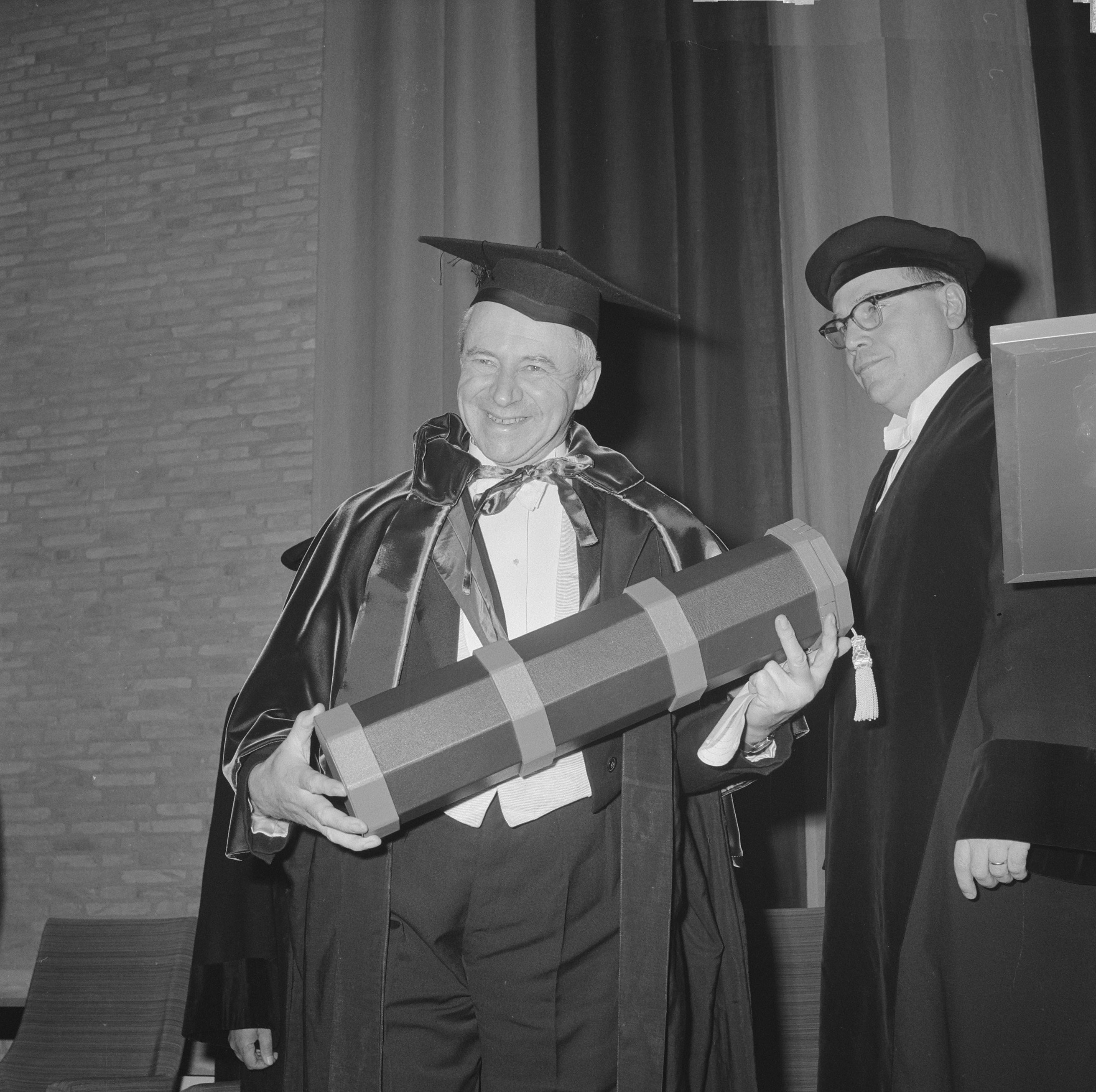 Collectie / Archief : Fotocollectie Anefo Reportage / Serie : [ onbekend ] Beschrijving : Eredoctoraten in Tilburg, Colin Clarke, professor aan de universiteit van Oxford, met bul Datum : 15 november 1962 Locatie : Noord-Brabant, Tilburg Trefwoorden : eredoctoraten, universiteiten Persoonsnaam : Clarke, Colin Fotograaf : Nijs, Jac. de / Anefo Auteursrechthebbende : Nationaal Archief Materiaalsoort : Negatief (zwart/wit) Nummer archiefinventaris : bekijk toegang 2.24.01.03 Bestanddeelnummer : 914-5130